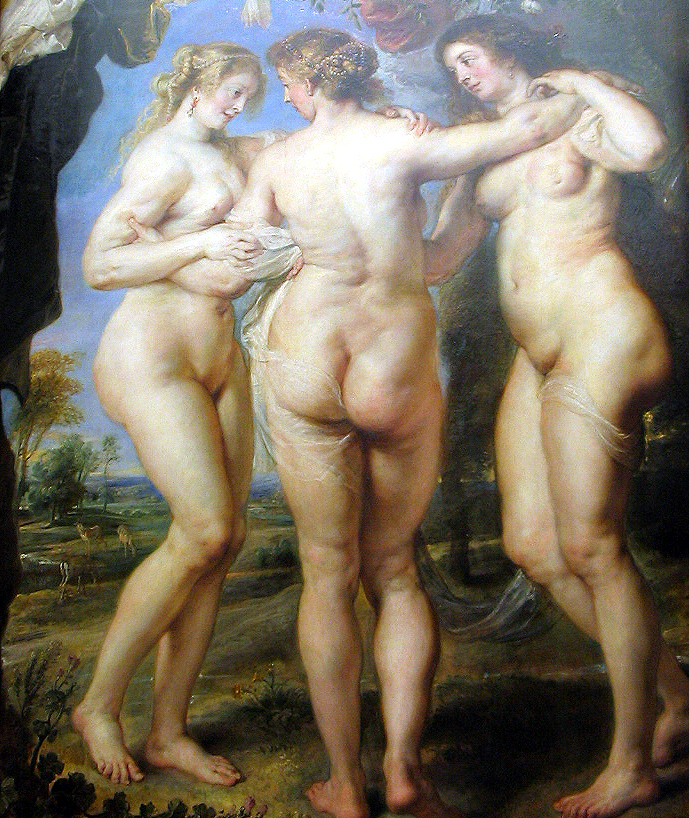 Fotografía digital realizada por Pablo Alberto Salguero Quiles el Domingo, 29 de febrero de 2004, 12:33:06 en el Museo del Prado de Madrid (España). La fotografía está realizada con un tiempo de exposición un poco largo con el fin de no utilizar flash, que no está permitido en el museo, así como trípode, por eso está un poco movida, o cuanto menos, no tan definida como deseaba. Se retocó con programas informáticos de edición de imágenes el color con el fin de que se ganase en definición de imagen. Así mismo, faltan unos pocos centímetros de los márgenes, principalmente debido al encuadre de la foto.